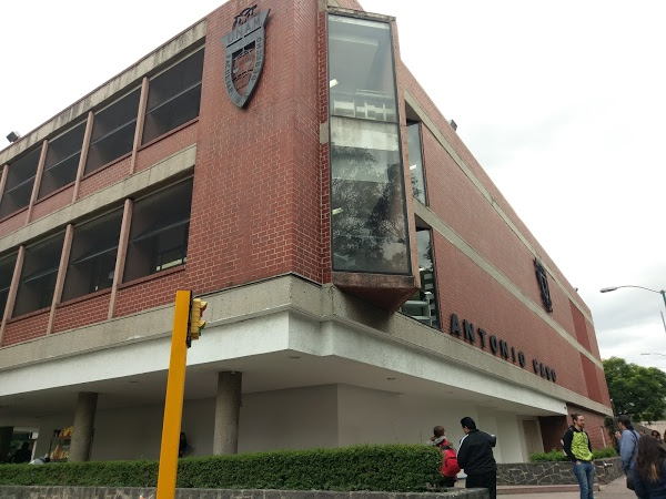 Biblioteca Antonio Caso